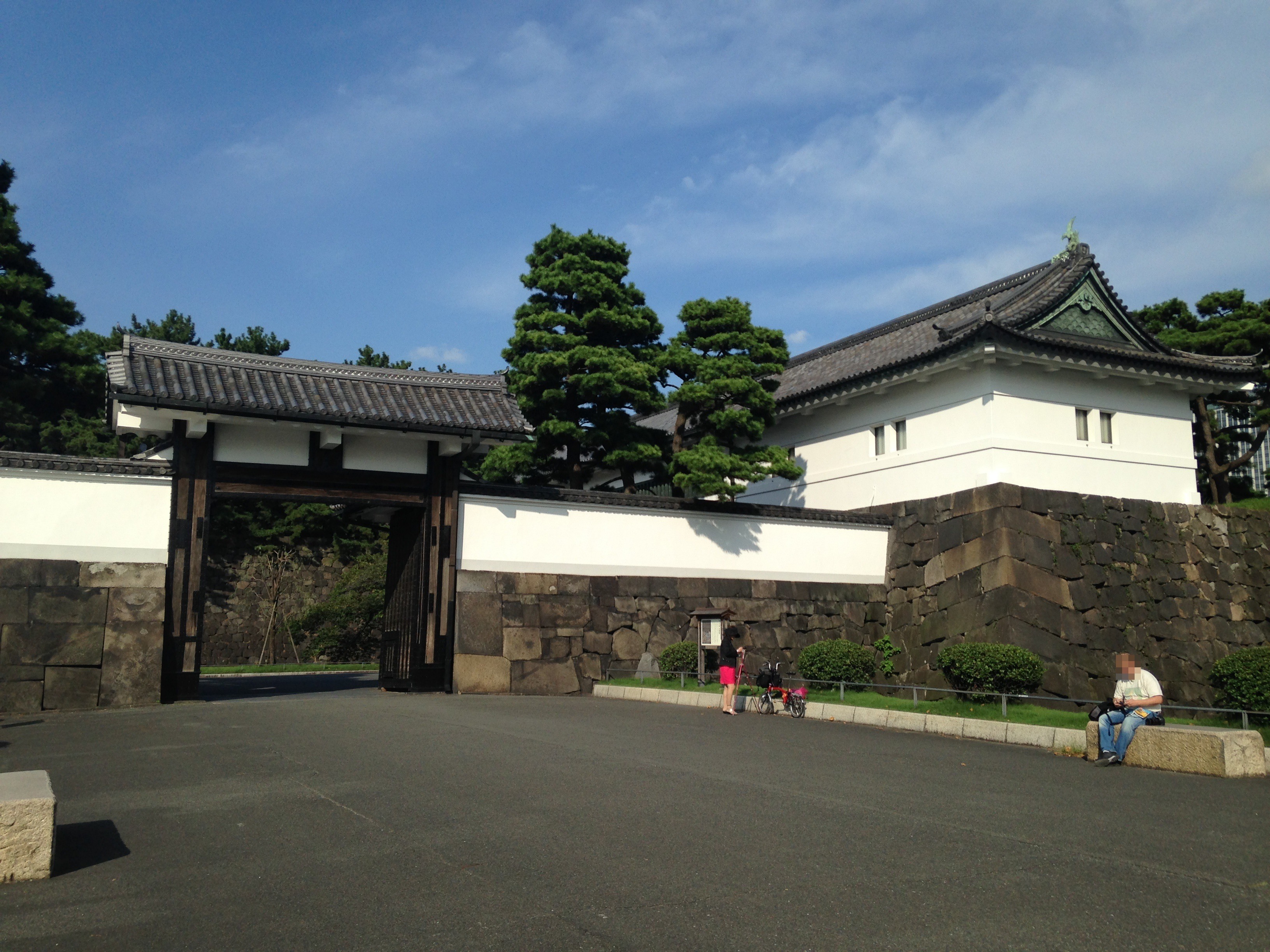 皇居の桜田門(高麗門)